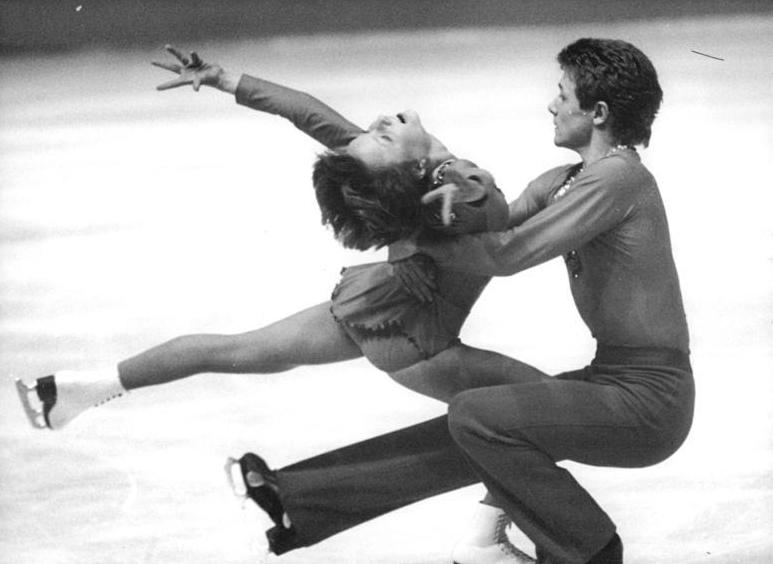 Sabine Baeß, Tassilo Thierbach ADN-ZB Thieme 15.12.1979 Karl-Marx-Stadt: DDR-Meisterschaften im Eiskunstlauf.- Sieger der Paar wurden Sabine Baeß und Tassilo Thierbach.